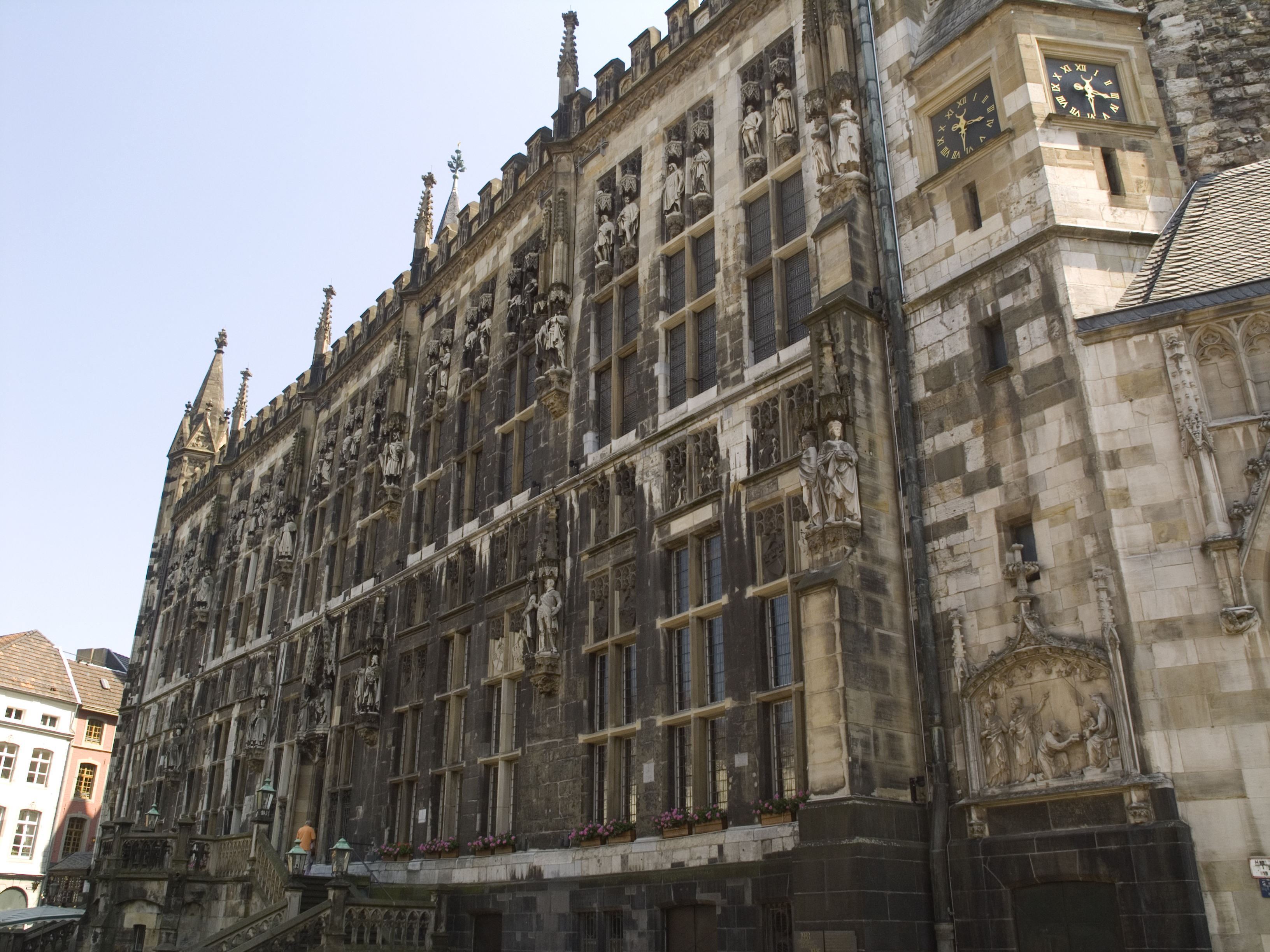 Северный Рейн - Вестфалия, Ахен - Ратуша (северный фасад)